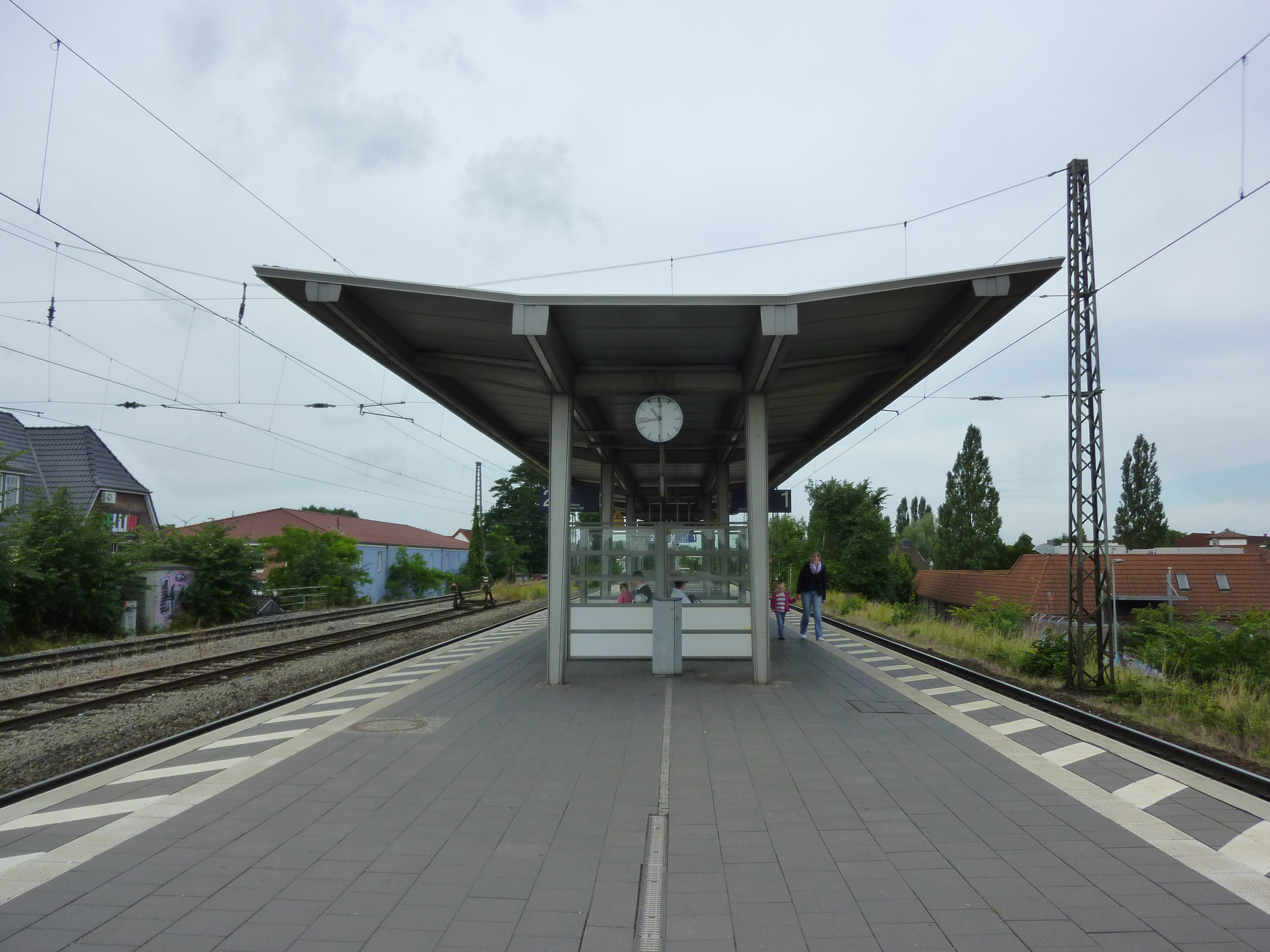 Bahnhof Bremen Oslebshausen